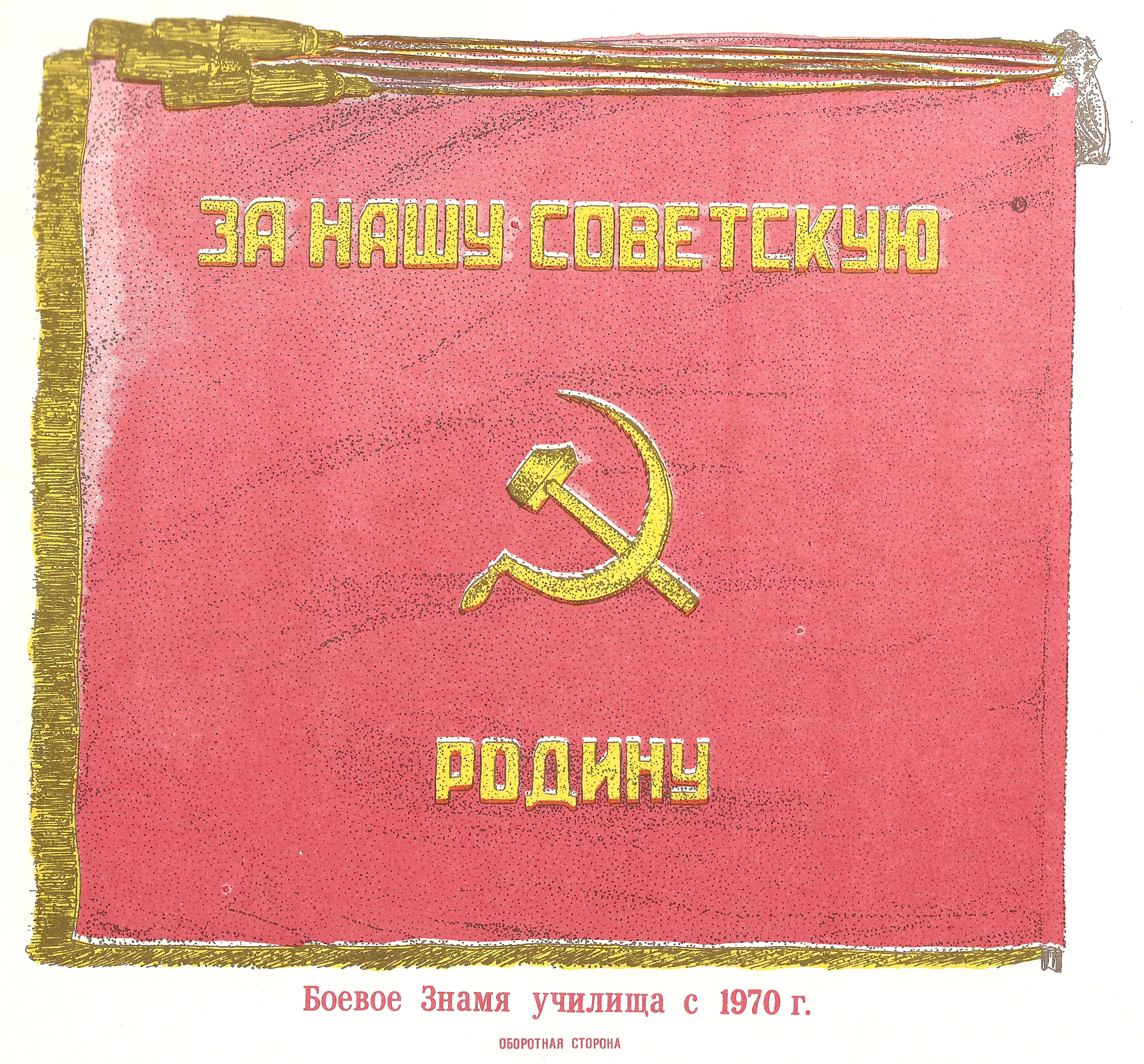 Изображение боевого знамени военно-топографического училища 1970 года (оборотная сторона)